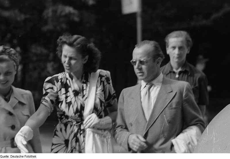 Original image description from the Deutsche Fotothek Bruni Löbel, Hertha Feiler und Heinz Rühmann, umgeben von anderen Personen